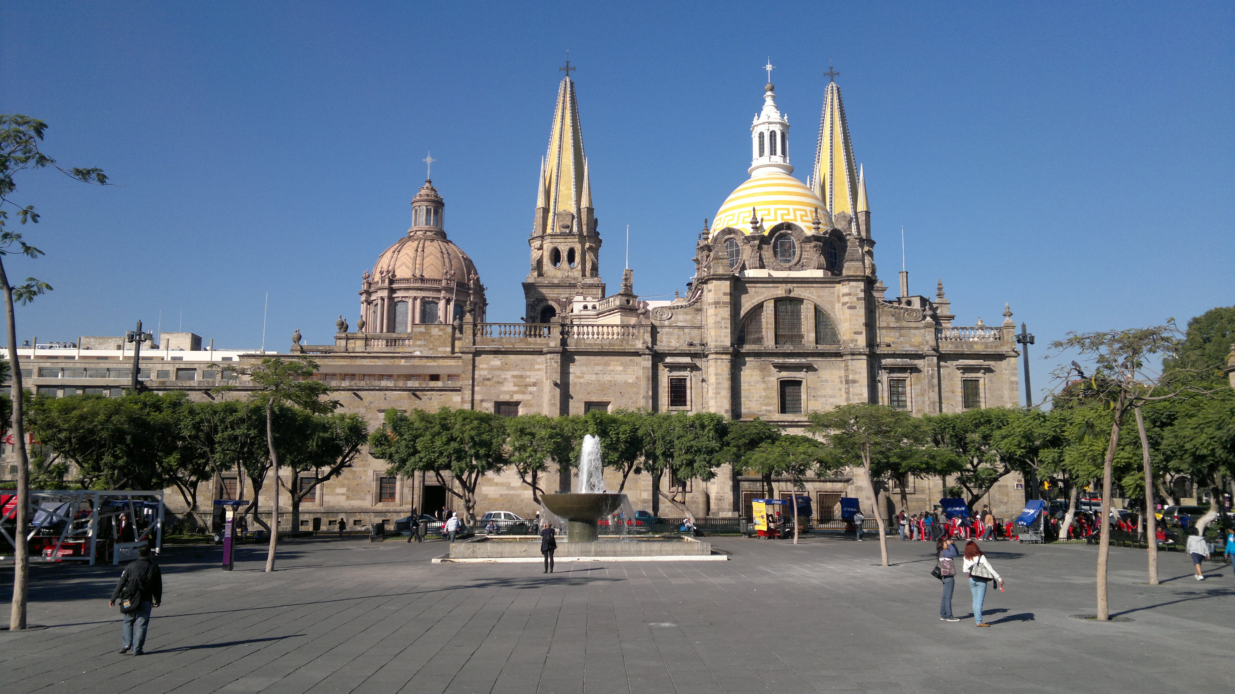 Plaza de Aramas y Catedral de Guadalajara, en la ciudad de Guadalajara, estado de Jalisco, México.